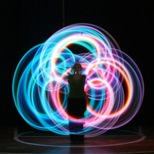 Teatr Ognia SIRRION, poi LED